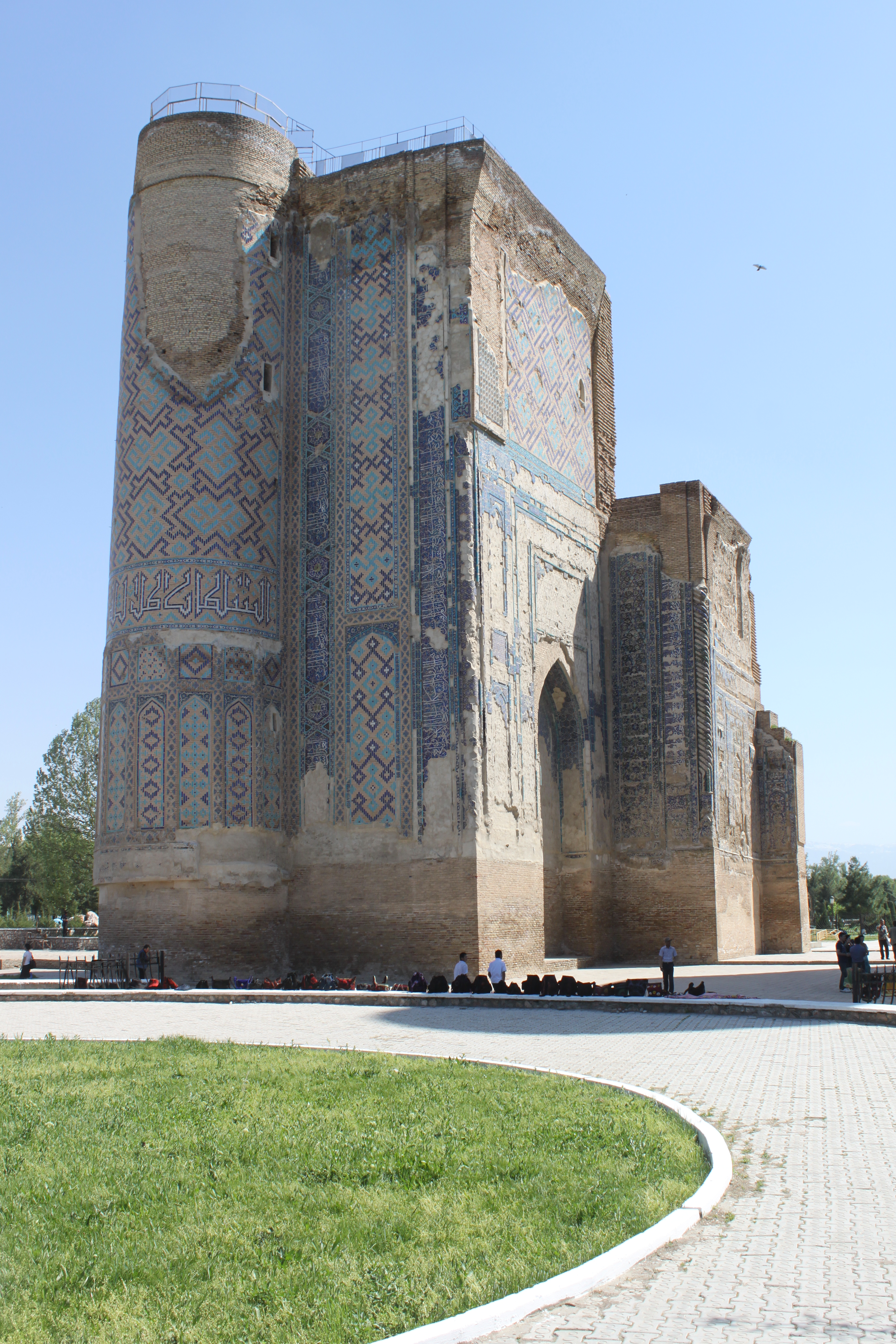 Ak Sarai à Shahrisabz